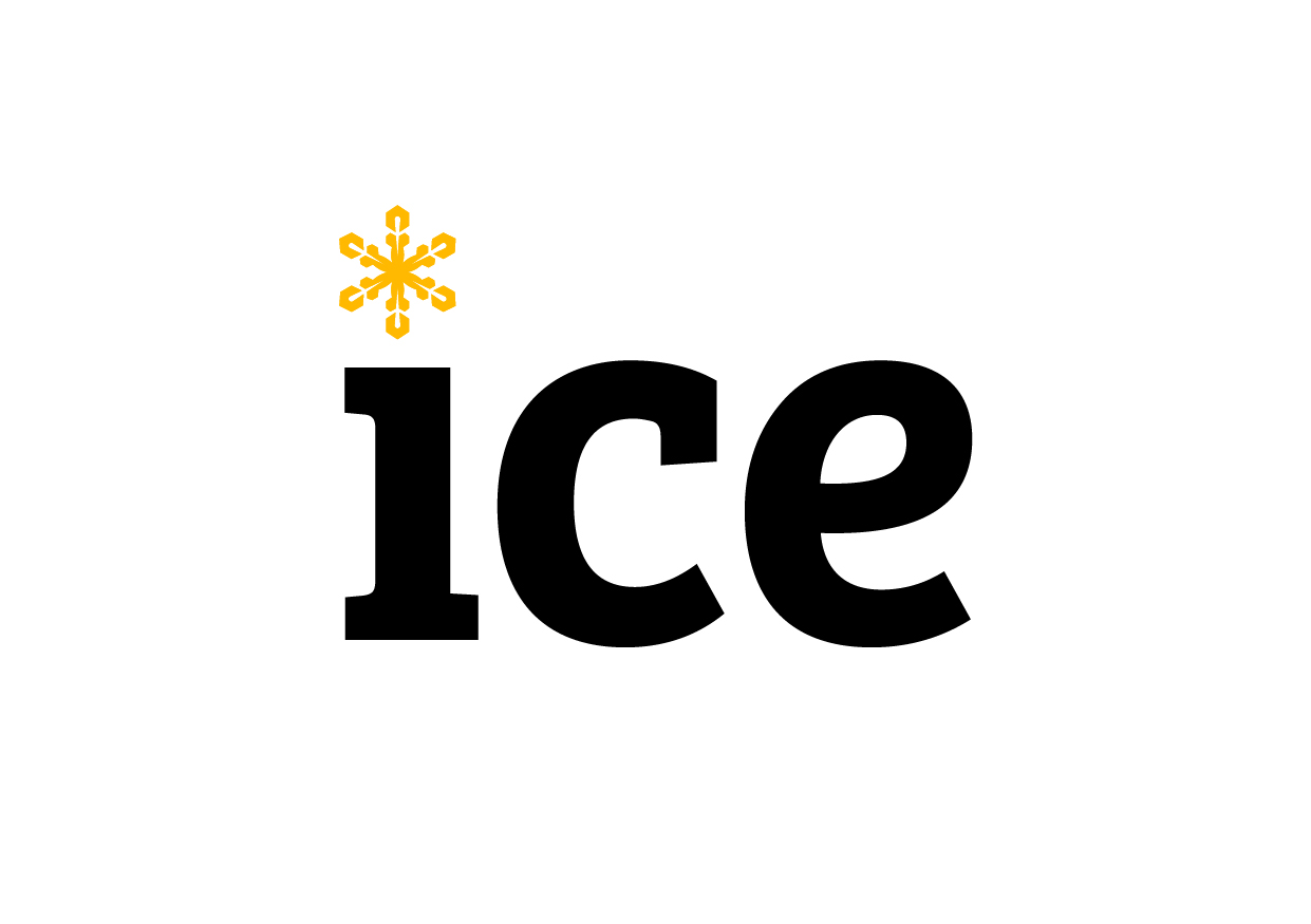 Den nye logoen til ice som ble publisert i januar 2018